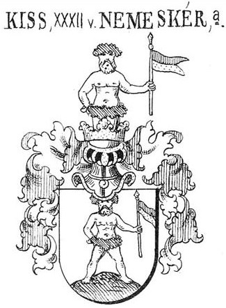 A nemeskéri Kiss család cimere